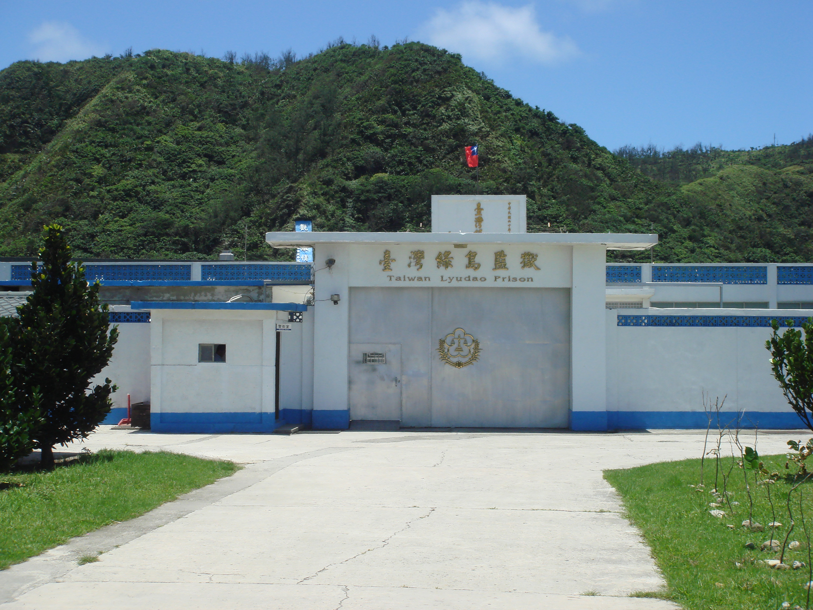 臺灣綠島監獄(Taiwan Lyudao Prison)